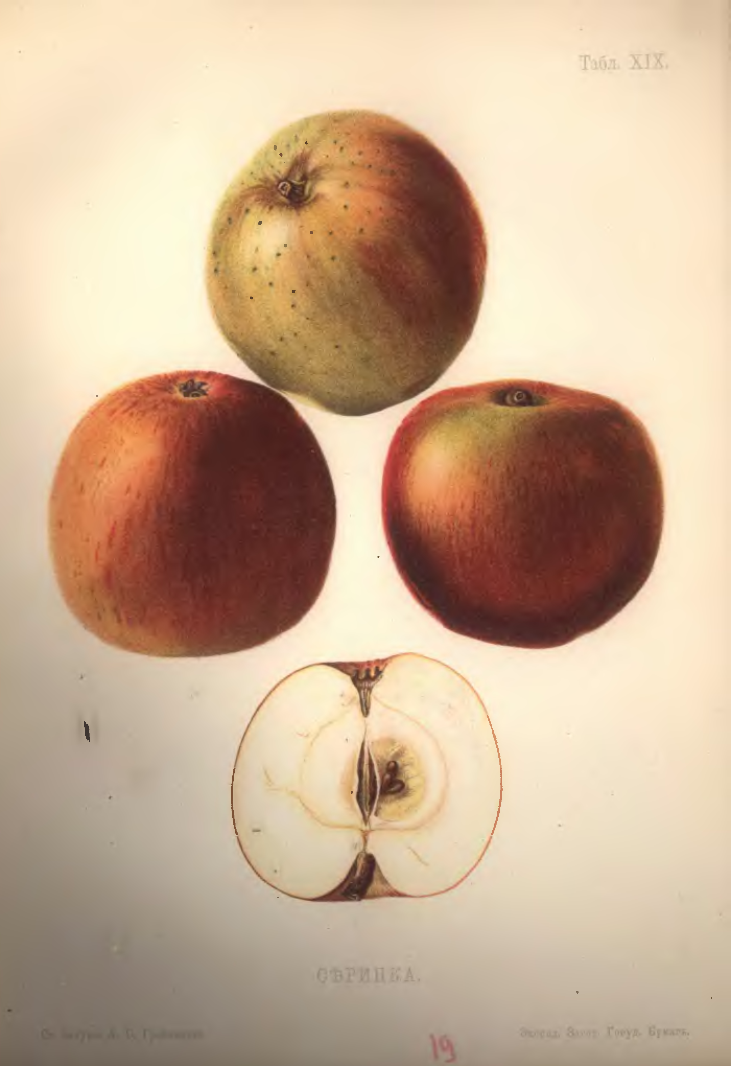 Серинка